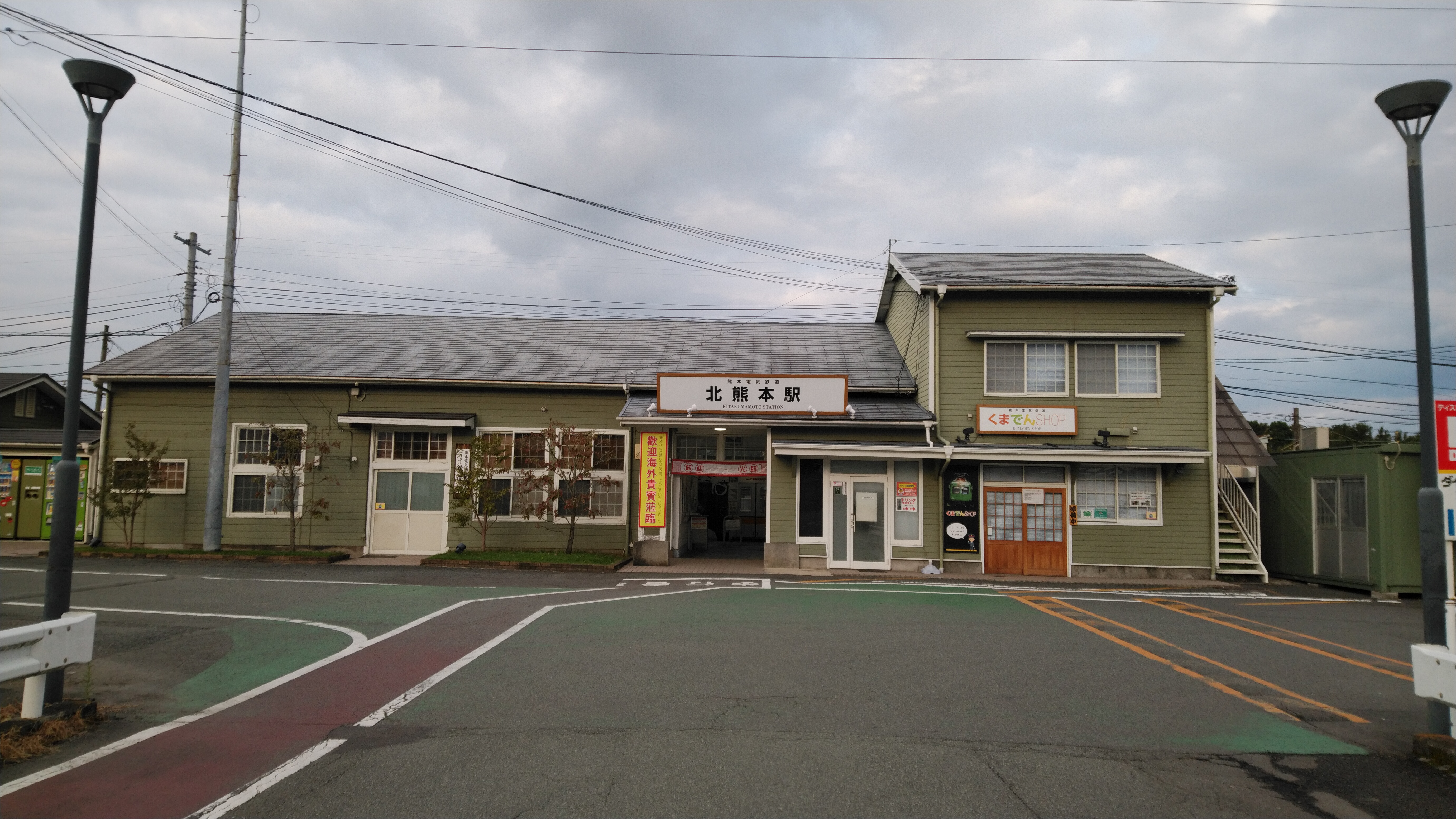 熊本電鉄北熊本駅の駅舎(正面からの撮影)です。